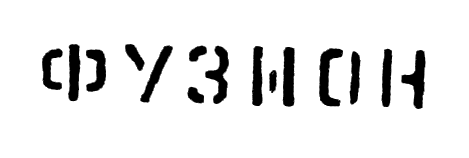 Fusion-Schriftzug.